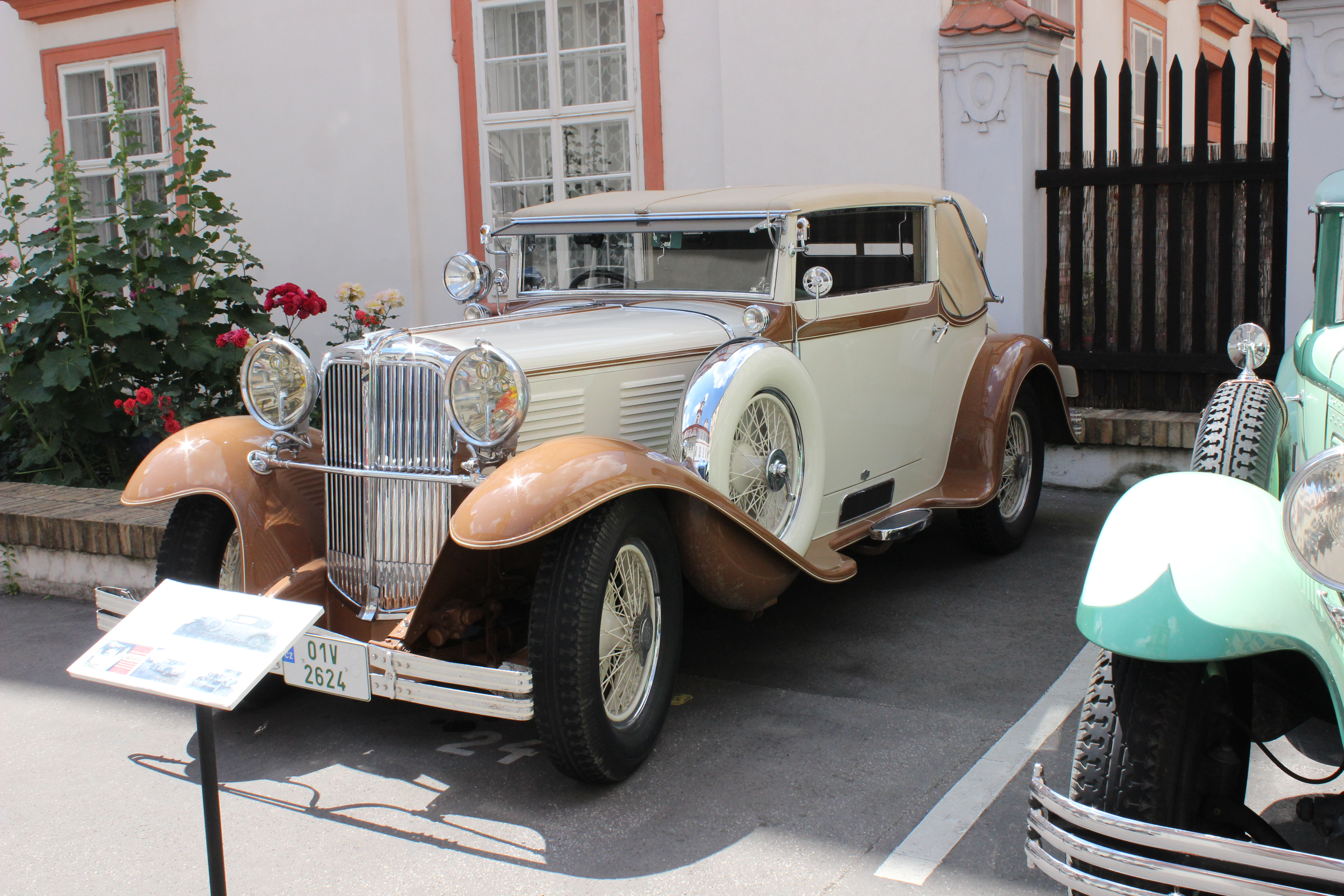 Objekty vystavené na výstavě „Český kabriolet a kupé v průběhu století“ uspořádané v areálu Fakulty dopravní Českého vysokého učení technického v Praze.